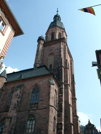 Foto der Heiliggeist Kirche in Heidelberg (Außenansicht).